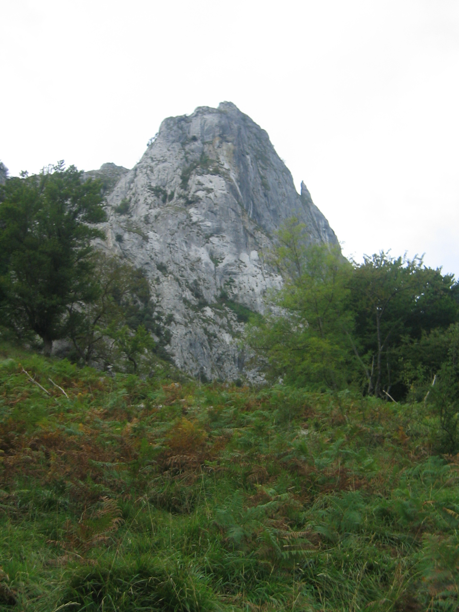 Anboto, espolón de Fraile atxa. (Duranguesado)Vizcaya, País Vaco, España.